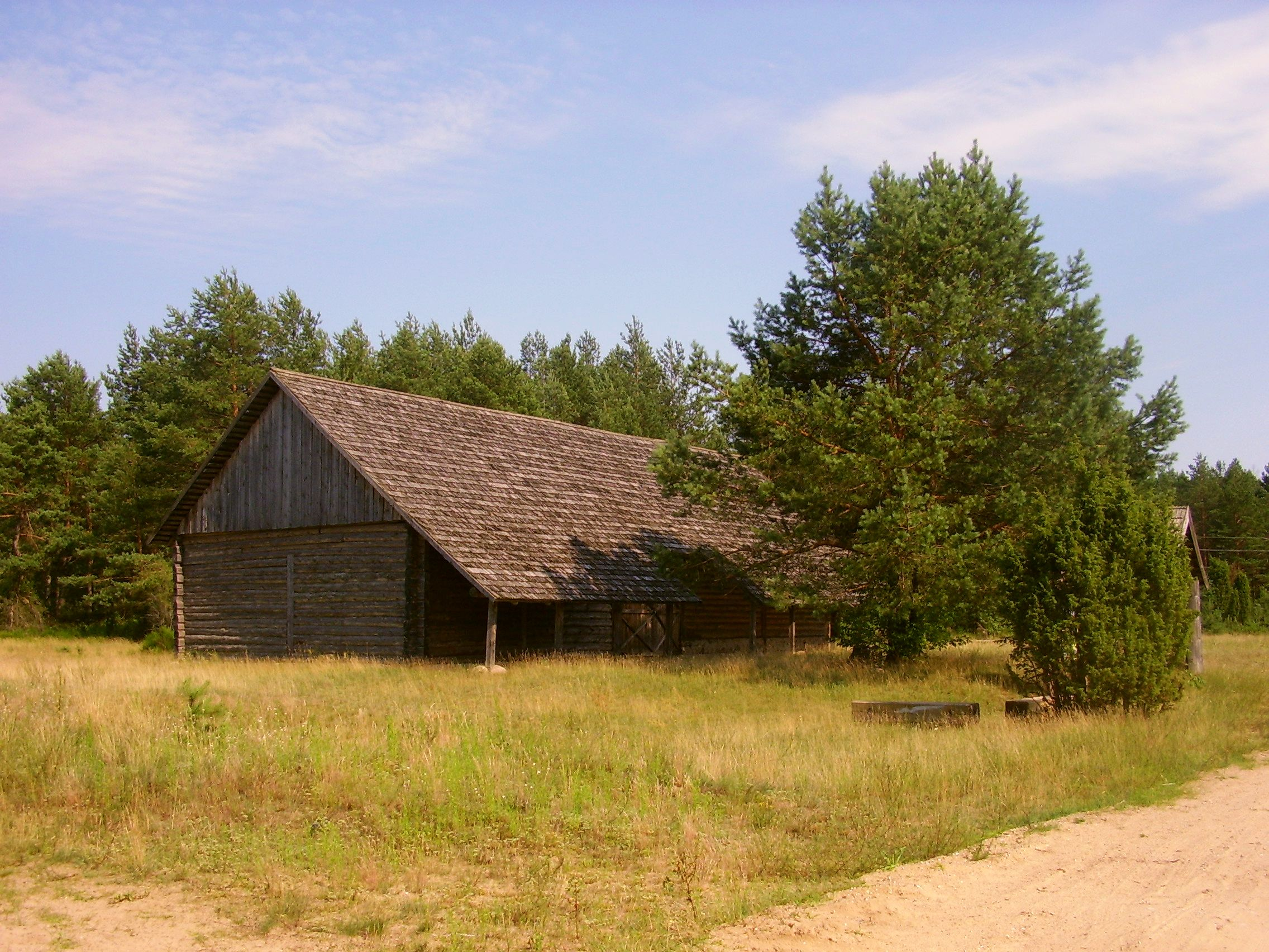 Margionių teatras